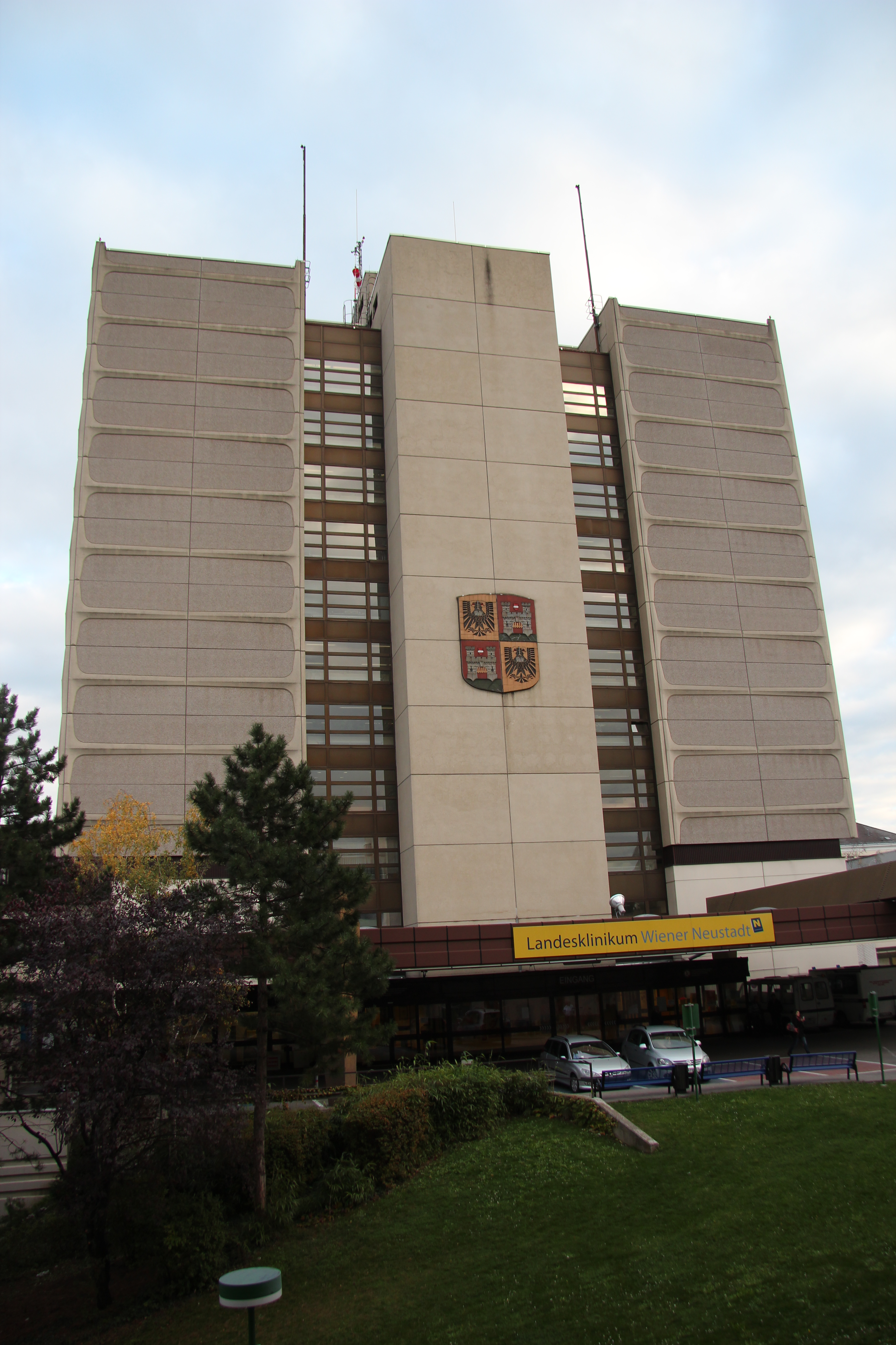 Haupteingang des Landesklinikums Wiener Neustadt